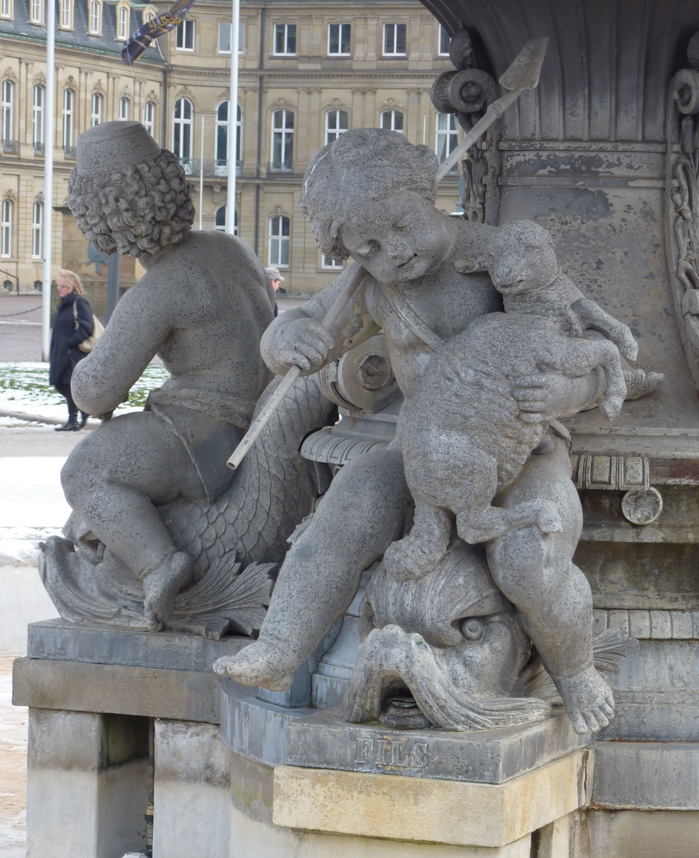 Schlossplatzspringbrunnen, Detail